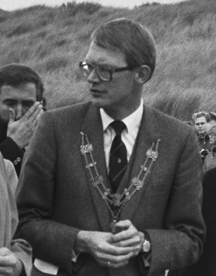 Koninklijk bezoek aan de waddeneilanden. Op het strand bij Hollum (Am) tijdens een demonstratie van de reddingboot. Van links naar rechts Prins Claus, Hans Lesterhuis (burgemeester van Ameland), koningin Beatrix